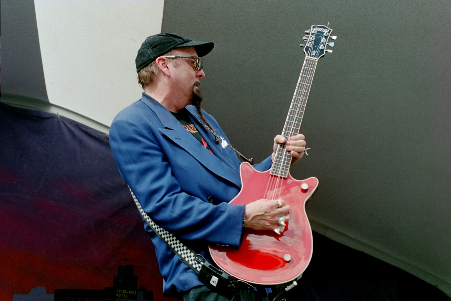 Gulfstream Park, Hallandale, Fl